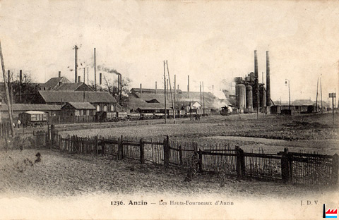 Anzin - Les Hauts-Fourneaux d'Anzin